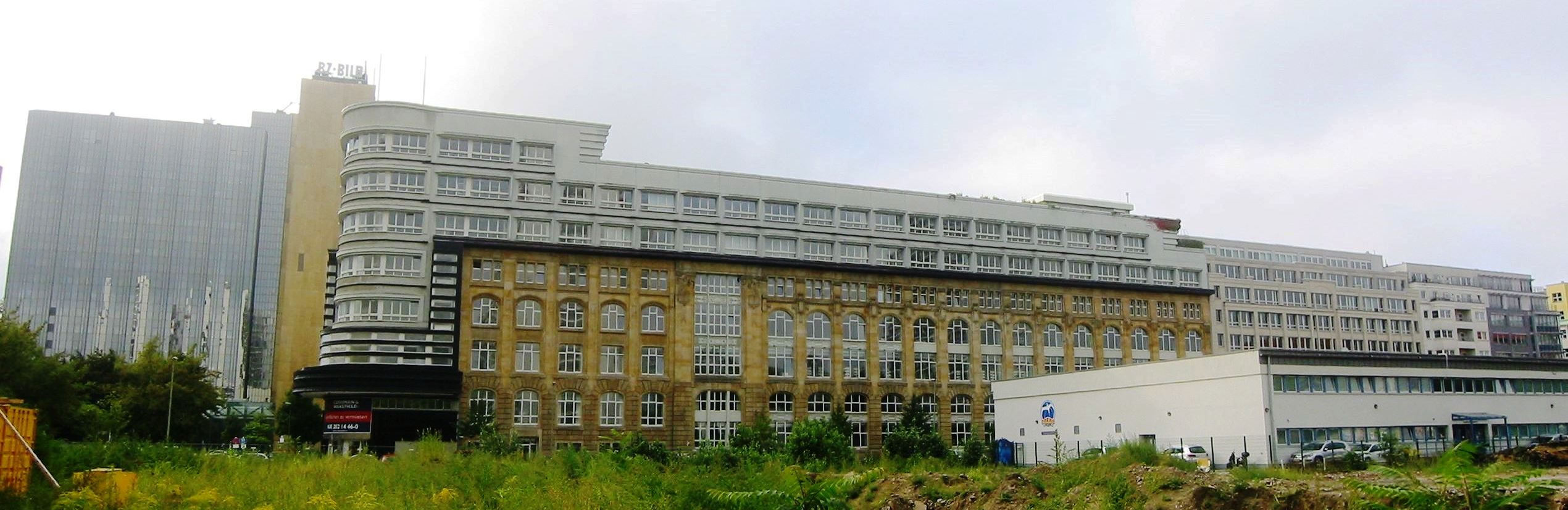 Nordansicht des Mossezentrums in Berlin-Mitte